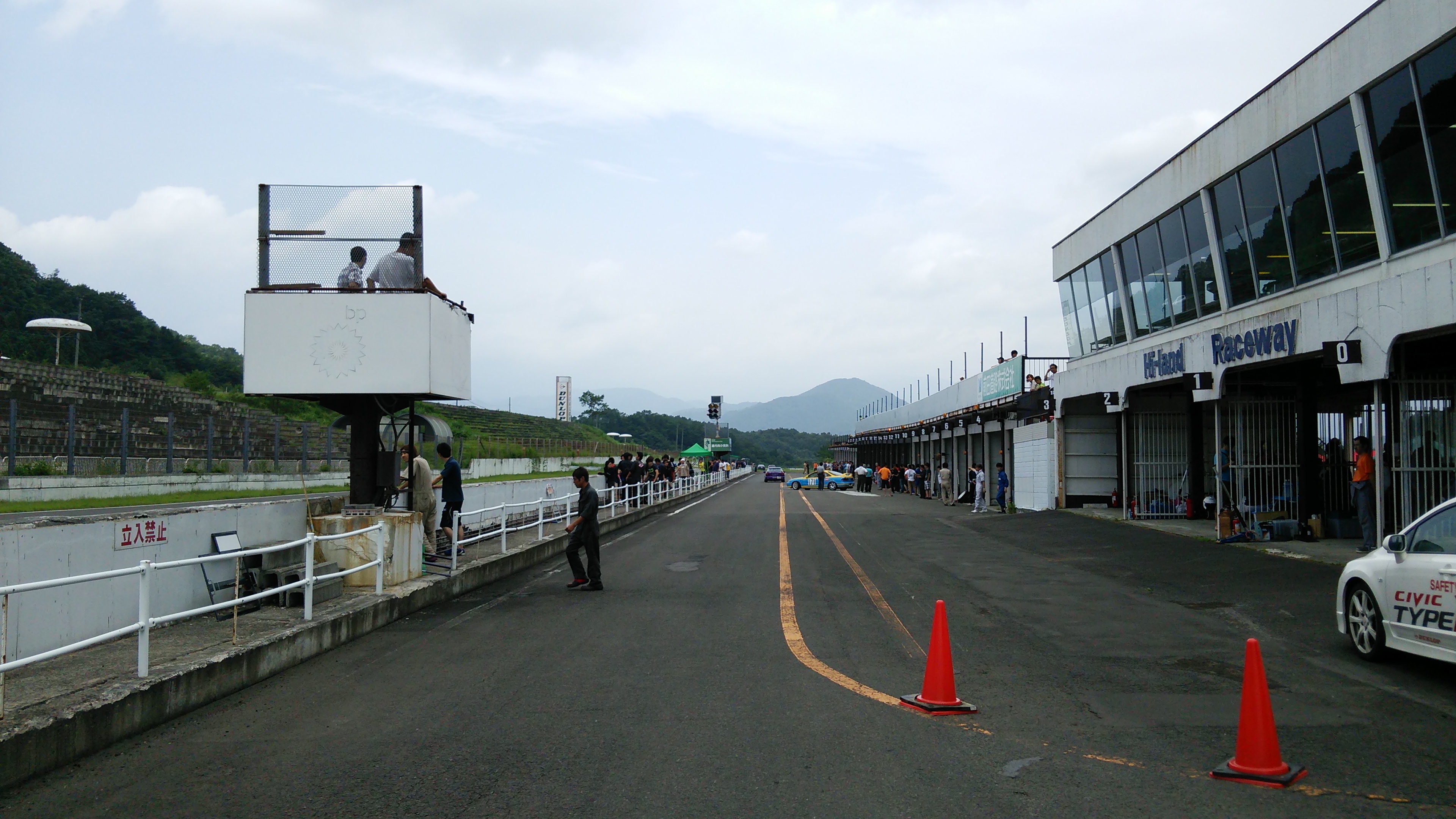 レースコースピットロード